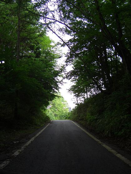 長野県道210号西伊那線、折草峠サミット部の写真